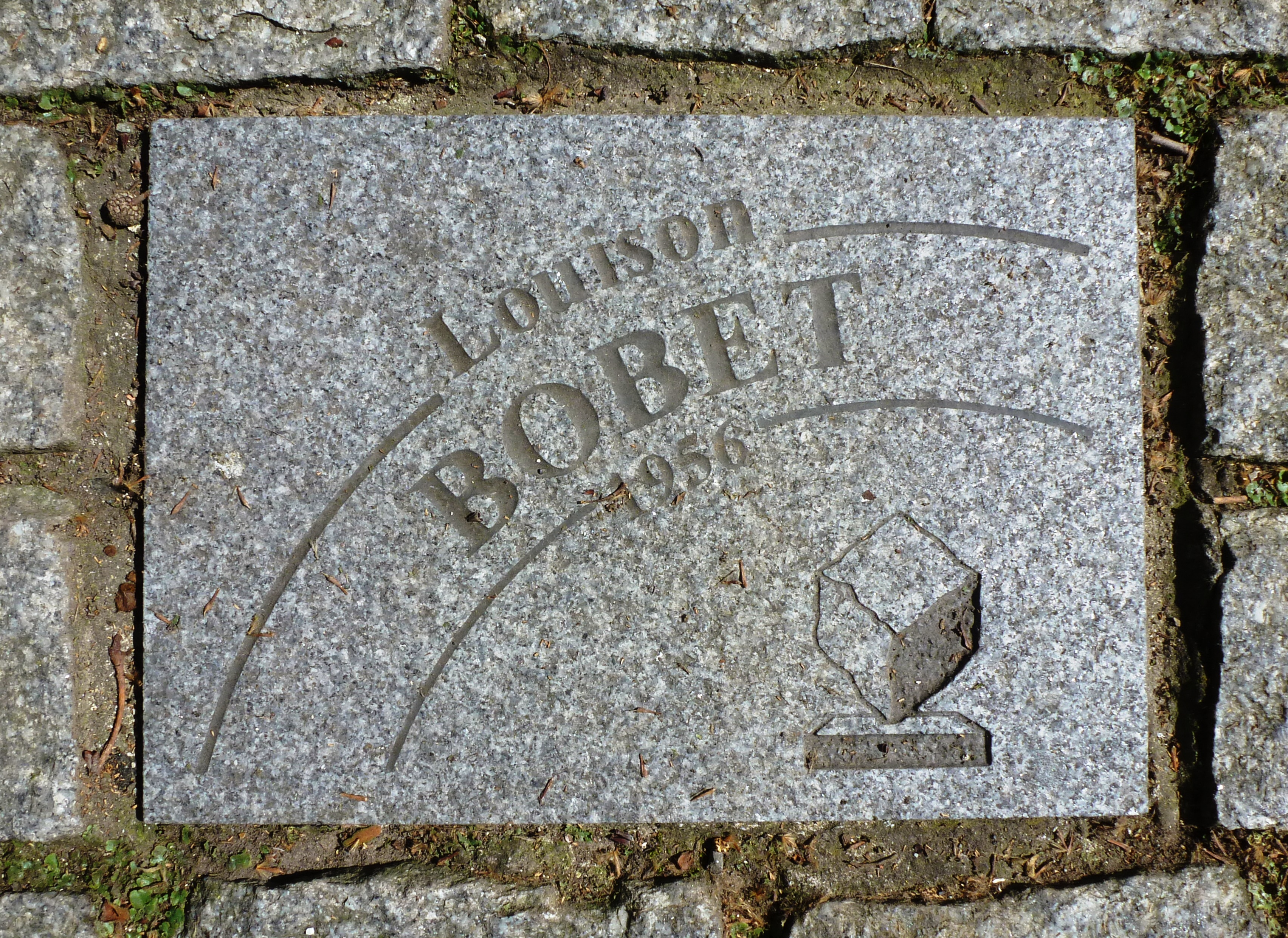 Pflasterstein für Louison Bobet auf der Allée Charles Crupelandt in Roubaix